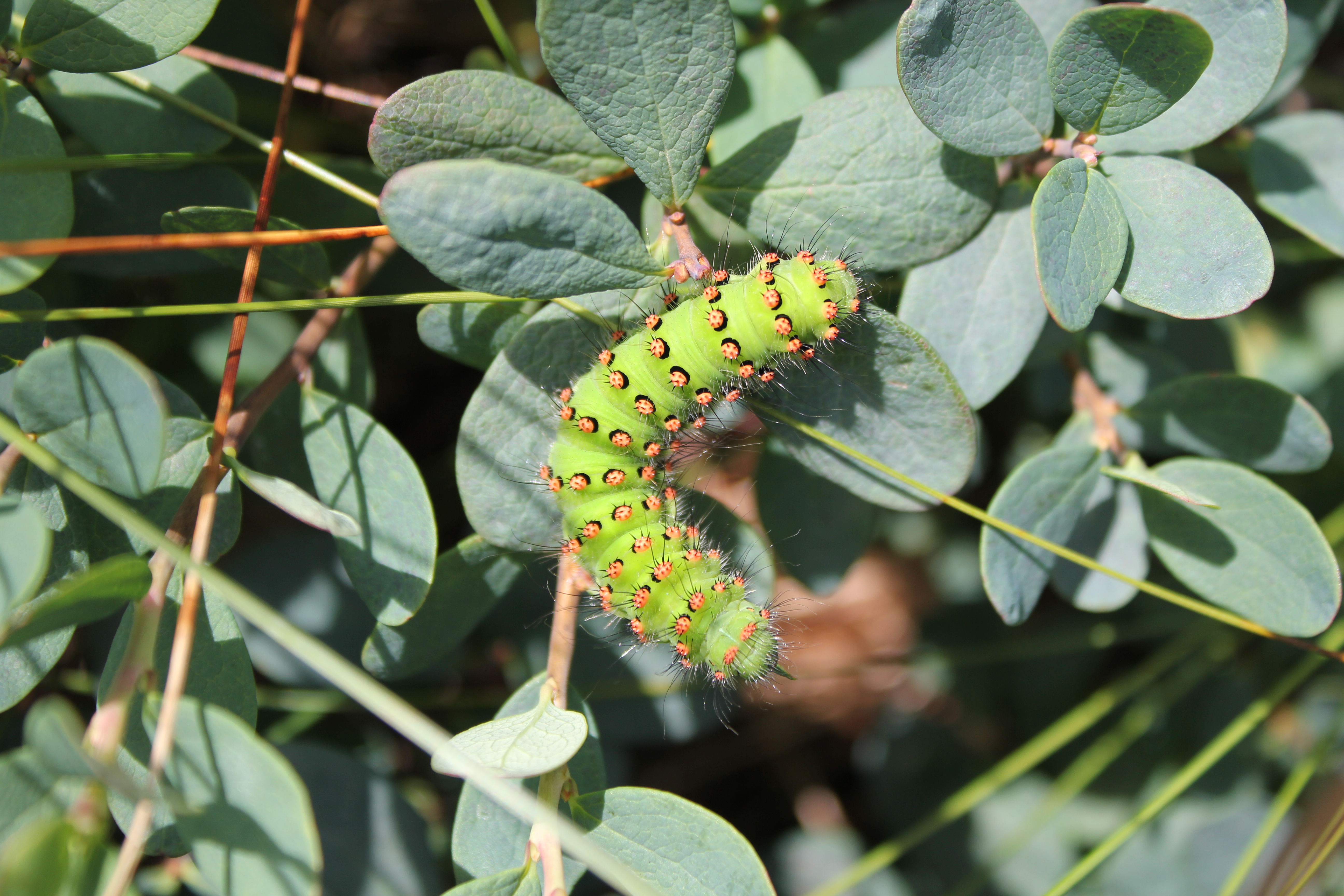 Raupe des Kleinen Nachtpfauenauges an Blättern der Rauschbeere, Schwarzes Moor in der Rhön, Germany Català=Petit paó de nit Česky=Martináč habrový English=Saturnia pavonia Español=Saturnia pavonia Suomi=Riikinkukkokehrääjä Français=Petit paon de nuit Magyar=Kis pávaszem Latina=Pavonia pavonia Lietuvių=Mažoji saturnija Nederlands=Nachtpauwoog Norsk=Vanlig påfuglspinner Polski=Pawica grabówka Русский=Павлиноглазка малая Svenska=Mindre påfågelspinnare Tiếng Việt=Ngài hoàng đế nhỏ